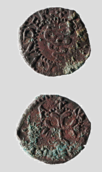 Moneta ritrovata presso la Chiesa di Sant'Antonino (Svizzera) durante i rilievi archeologici del 1986